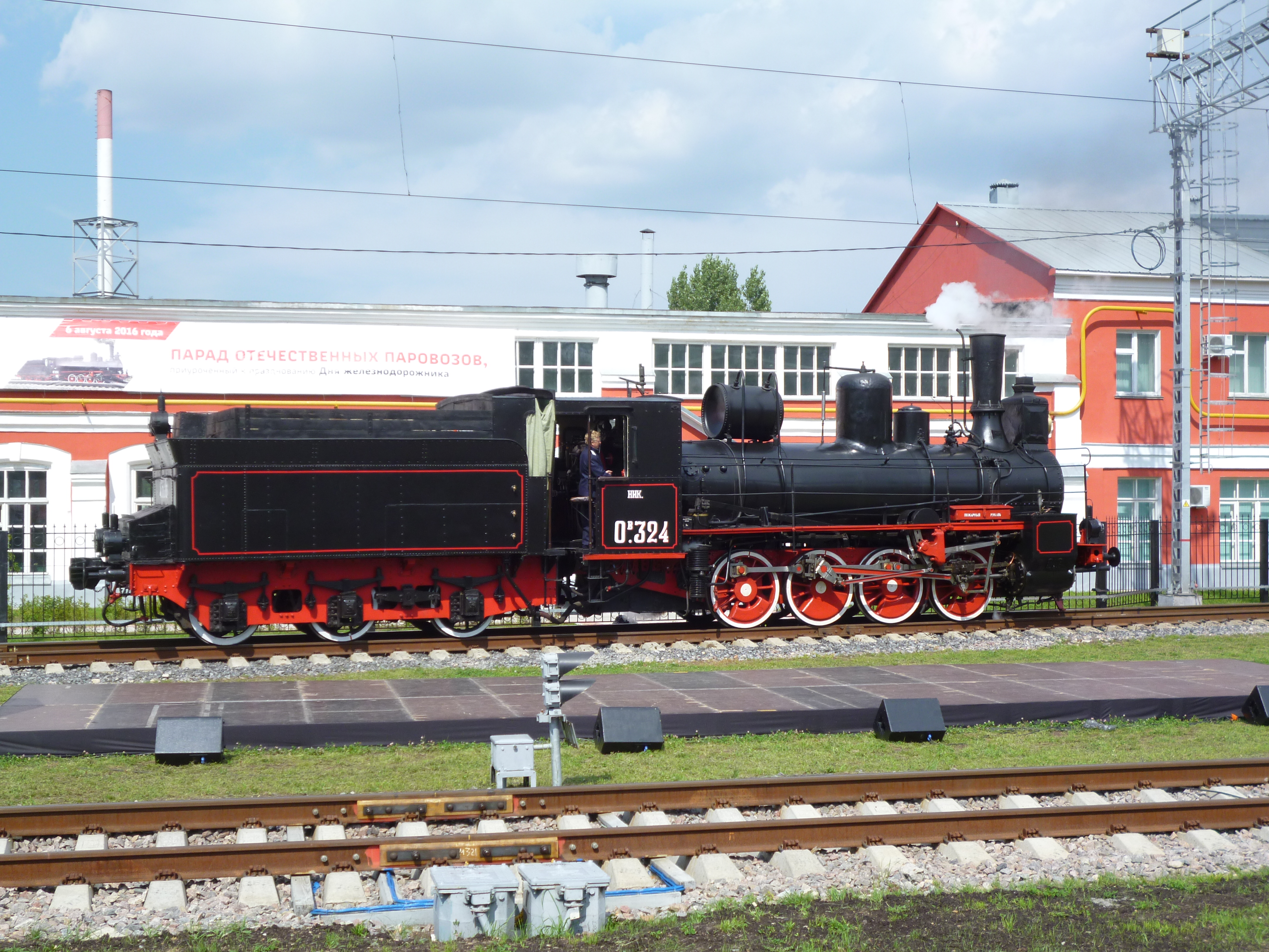 Паровоз Ов 324 на параде в депо Подмосковная